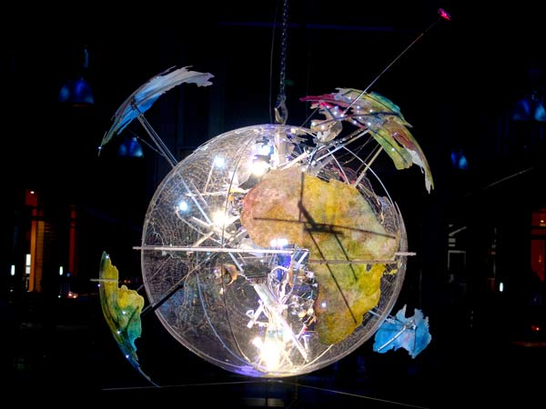 Kinetisches Kunstobjekt - erdsein - Christian Nienhaus